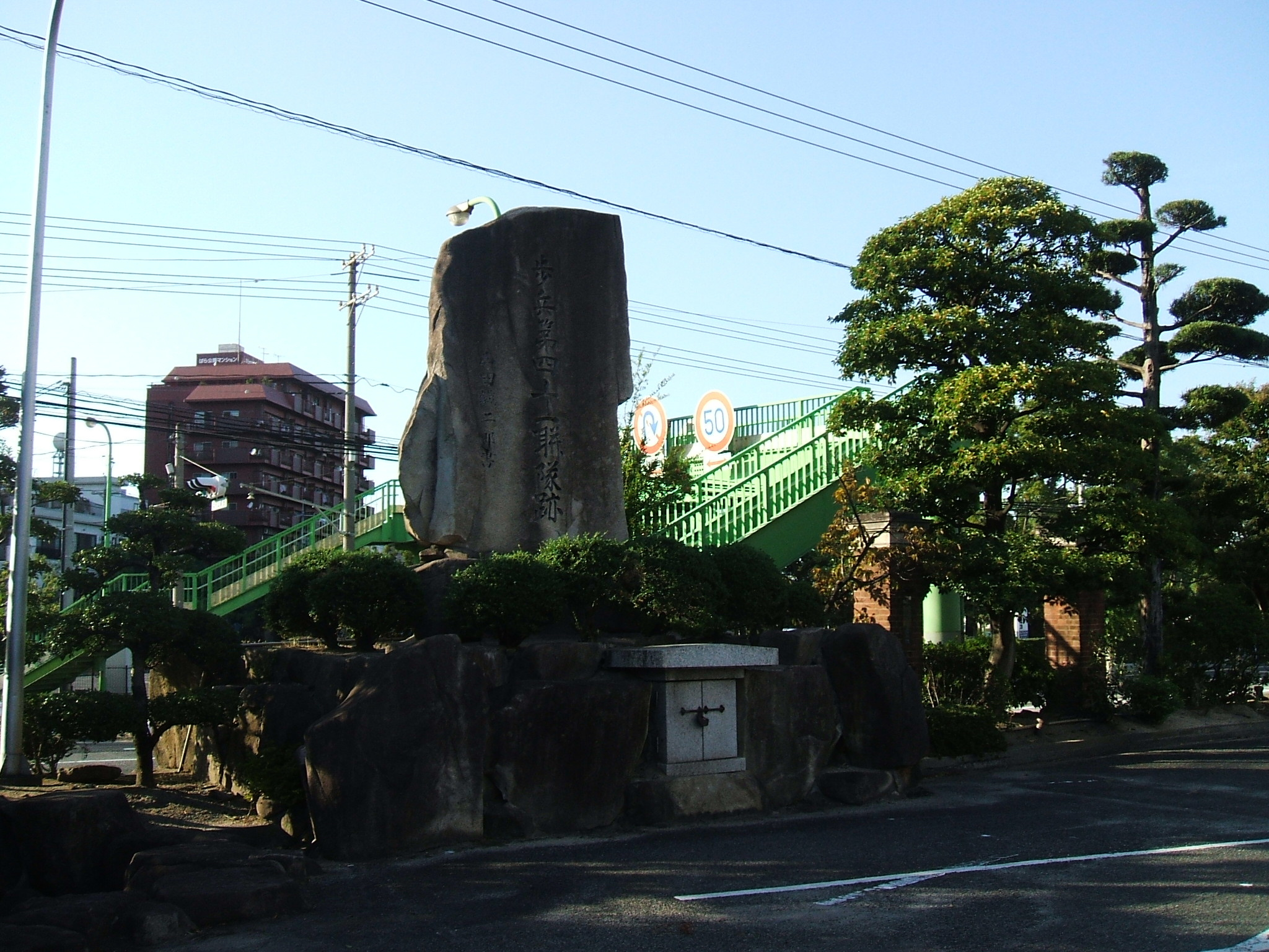 広島県福山市にある、歩兵第41連隊の基地跡を示す記念碑。